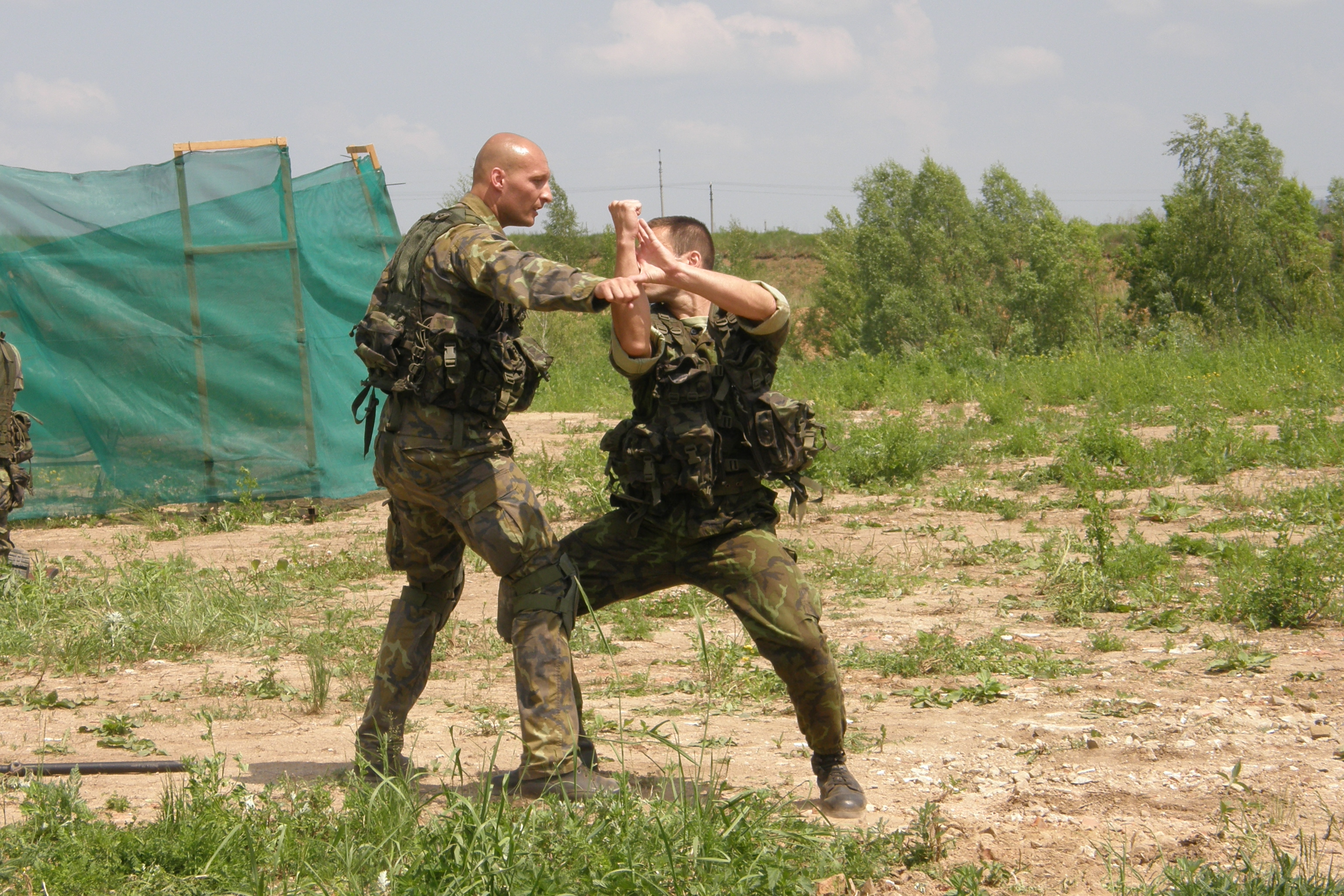 Ukázka vojáků ČR bojového umění Musado v Boskovicích